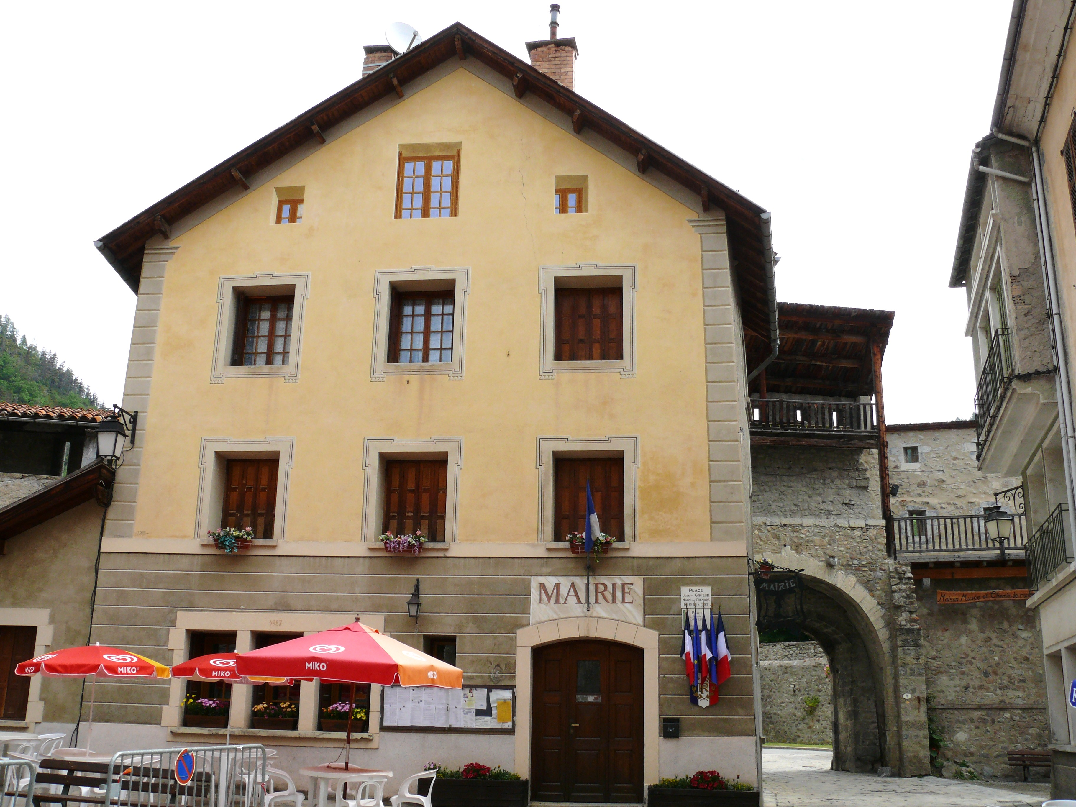 Colmars - Mairie